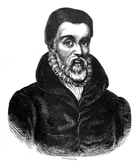 威廉廷德尔画像。作品超过100年，属于公有领域。